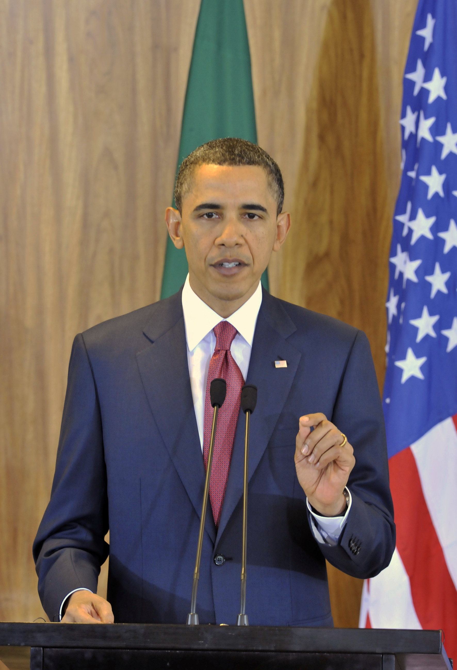 O presidente dos Estados Unidos, Barack Obama,durante declaração conjunta, no Palácio do Planalto